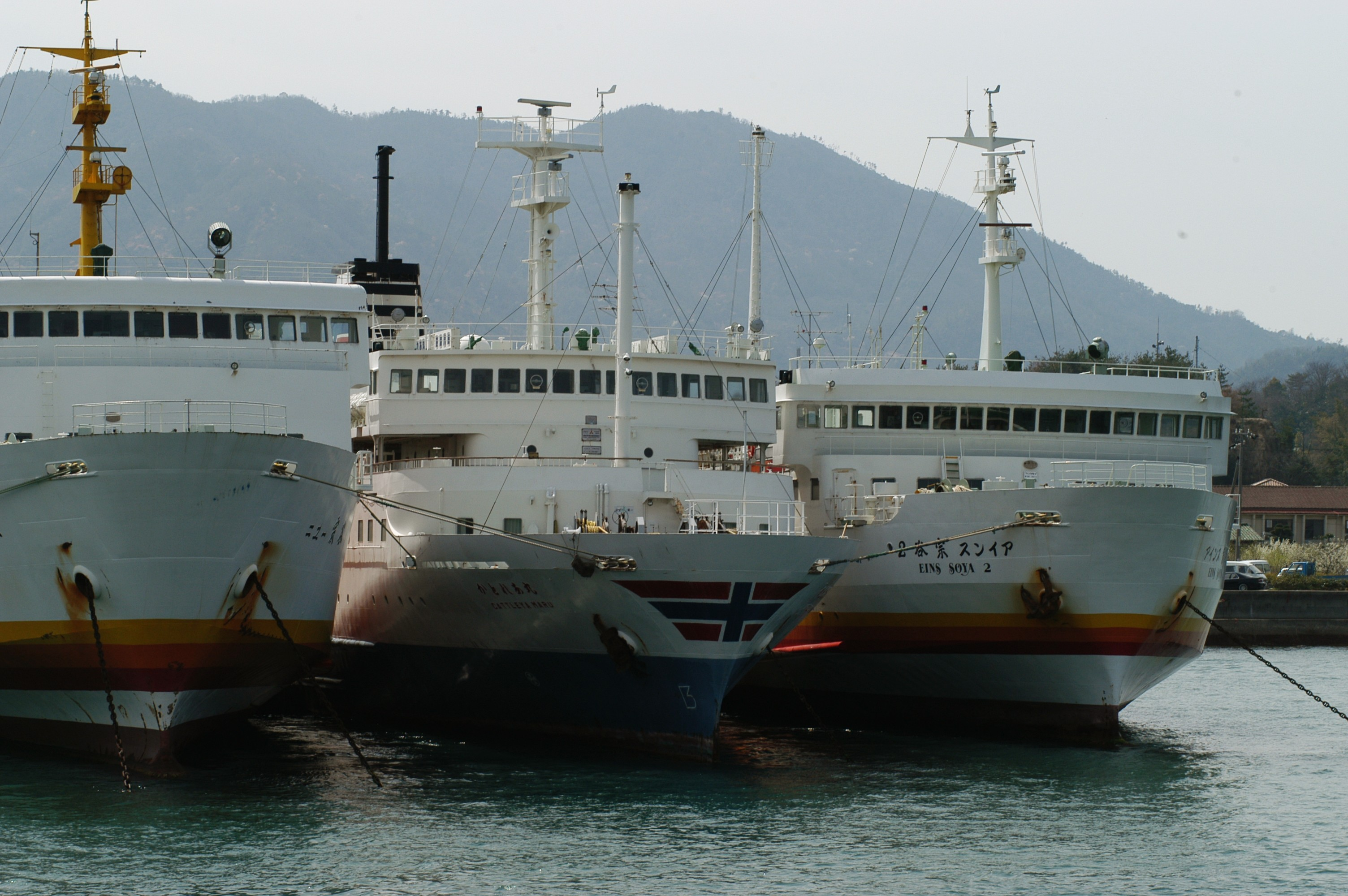 生口島・瀬戸田にて係船中の東海汽船かとれあ丸と東日本海フェリー(現ハートランドフェリー)・アインス宗谷2とニュー宗谷